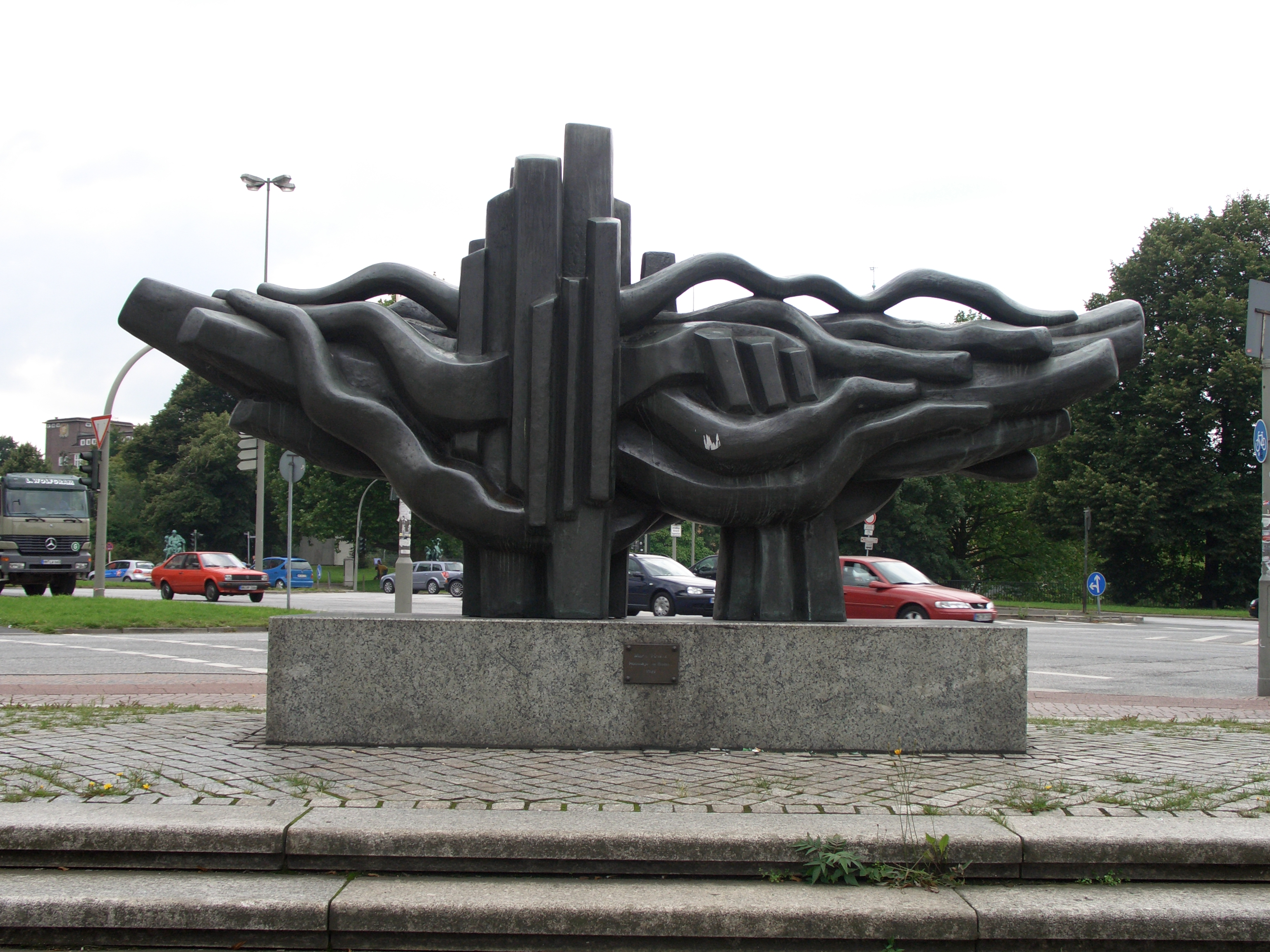 Skulptur von Maria Pirwitz auf dem Johannes-Brahms-Platz in Hamburg. Titel: "Hommage an Brahms". Fotografiert am 15.8.2005. Fotograf: Habe ich selbst fotografiert (Benutzer:bejo). Copyright Status: GNU Freie Dokumentationslizenz.